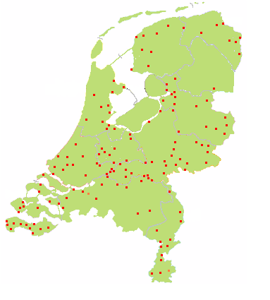 Behalve vestingsteden zijn ook de versterkte steden aangegeven. Oorspronkelijke kaart van Mtcv, zelf bewerkt, versie 2